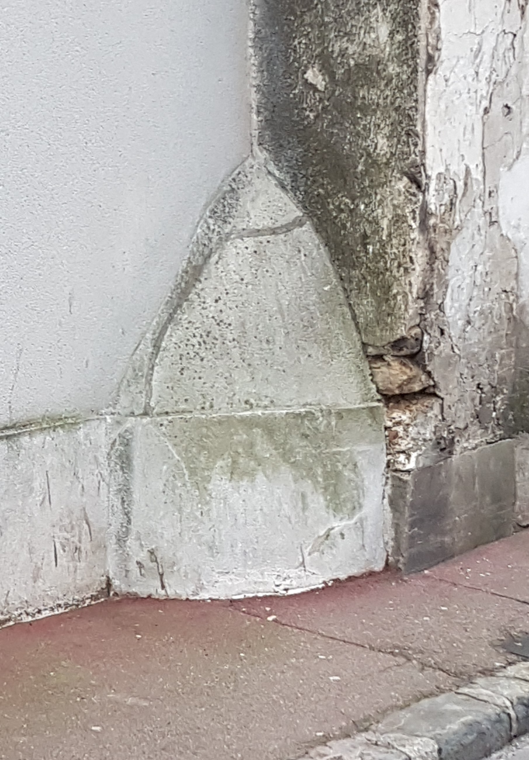 Eclabousseur de chaussettes rue Ernest Renan à Malakoff